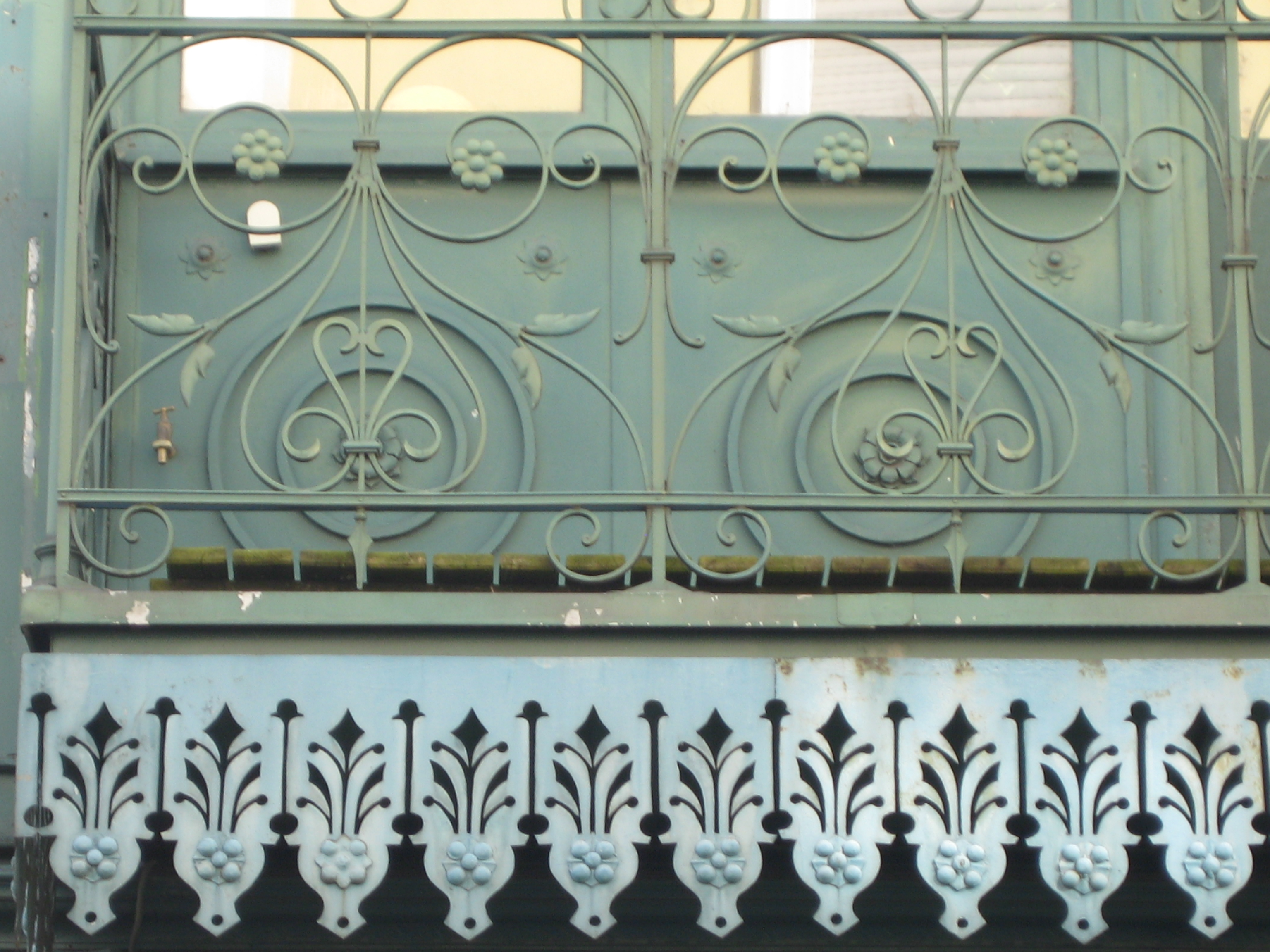 Das unter denkmalschutz stehende Haus im Jugendstil in der Karl-Marx-Straße mit Detailsansicht